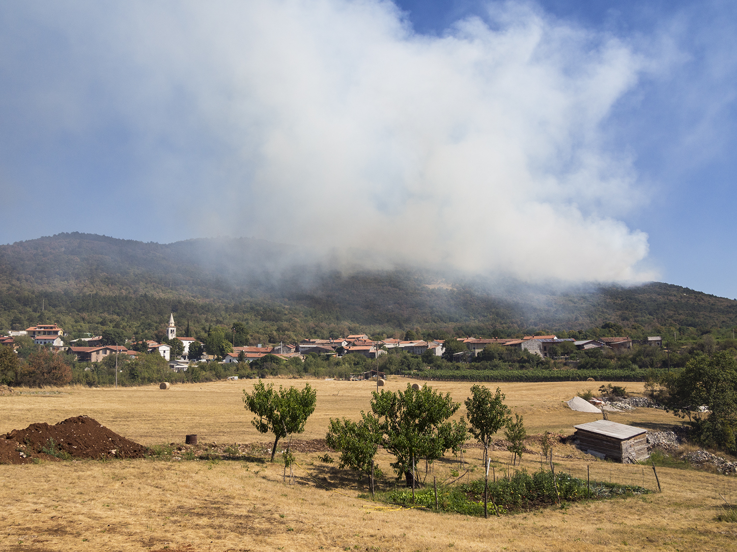 Požar na Trstelju z vasjo Lipa v ospredju.